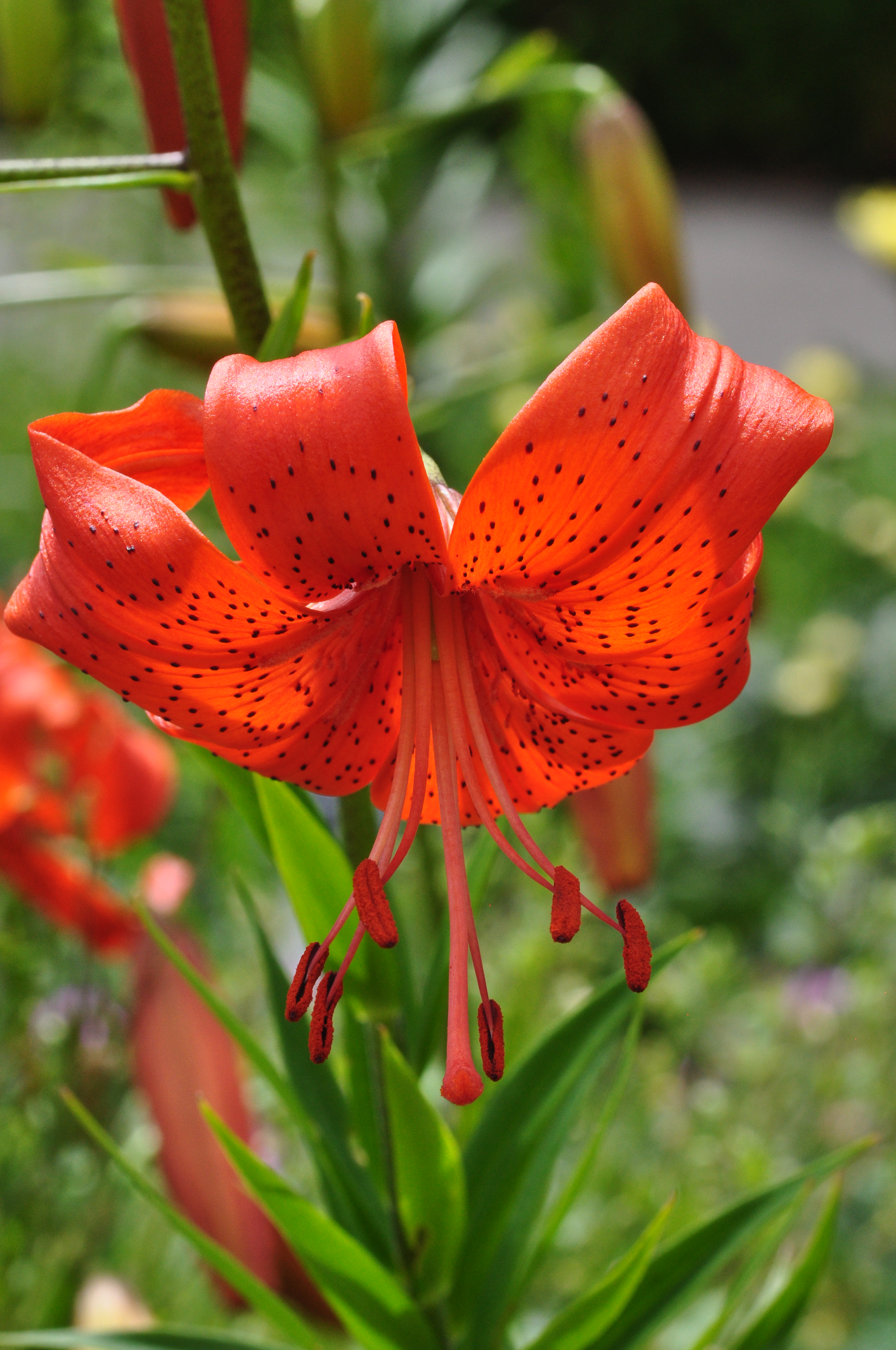 Лілія сорту "Бренда Ватс" у Королівському ботанічному саду (Онтаріо)